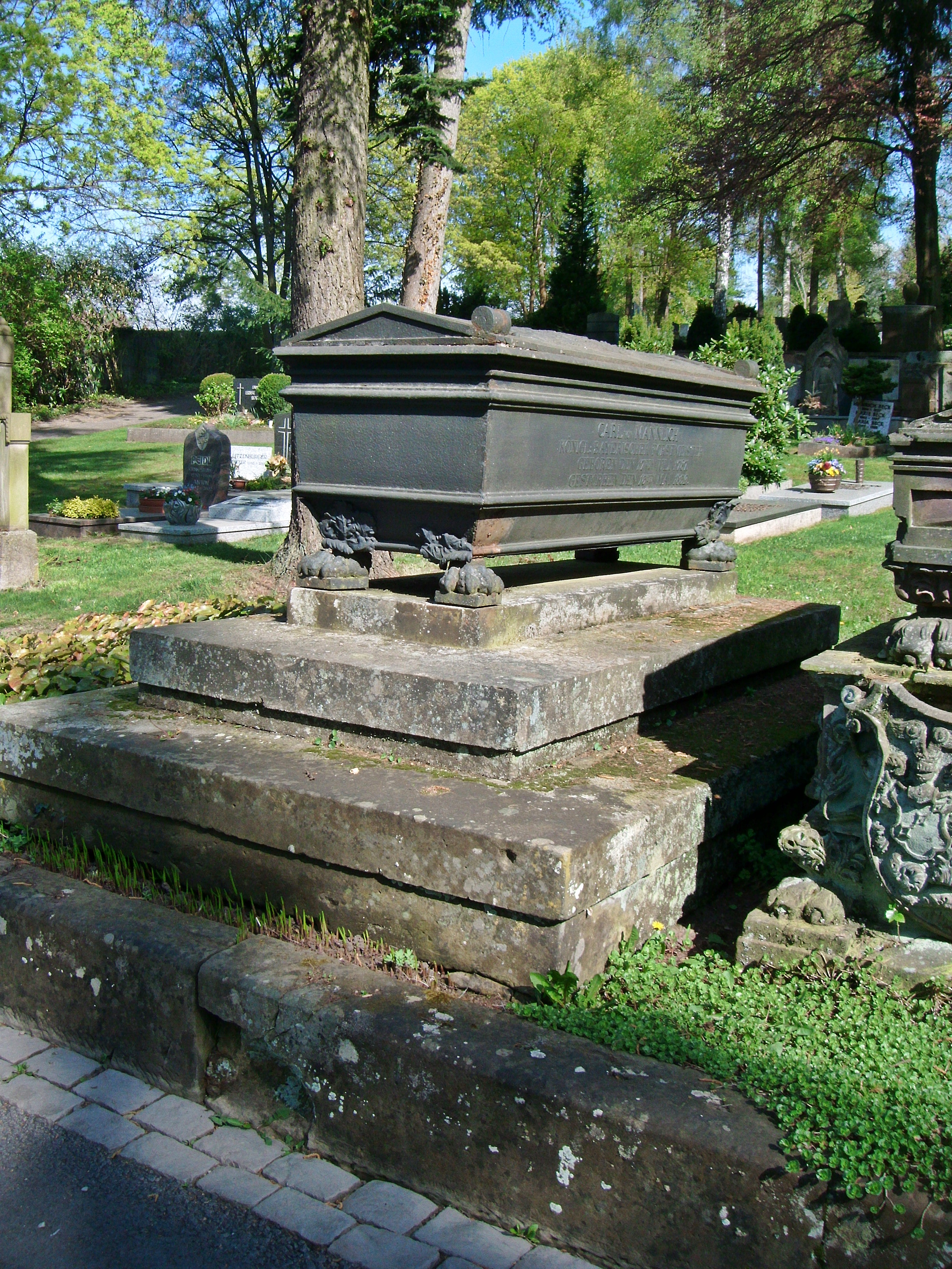 Carl von Mannlich (1787-1832), bayerischer Offizier und Forstmeister, Grab, Hauptfriedhof Zweibrücken